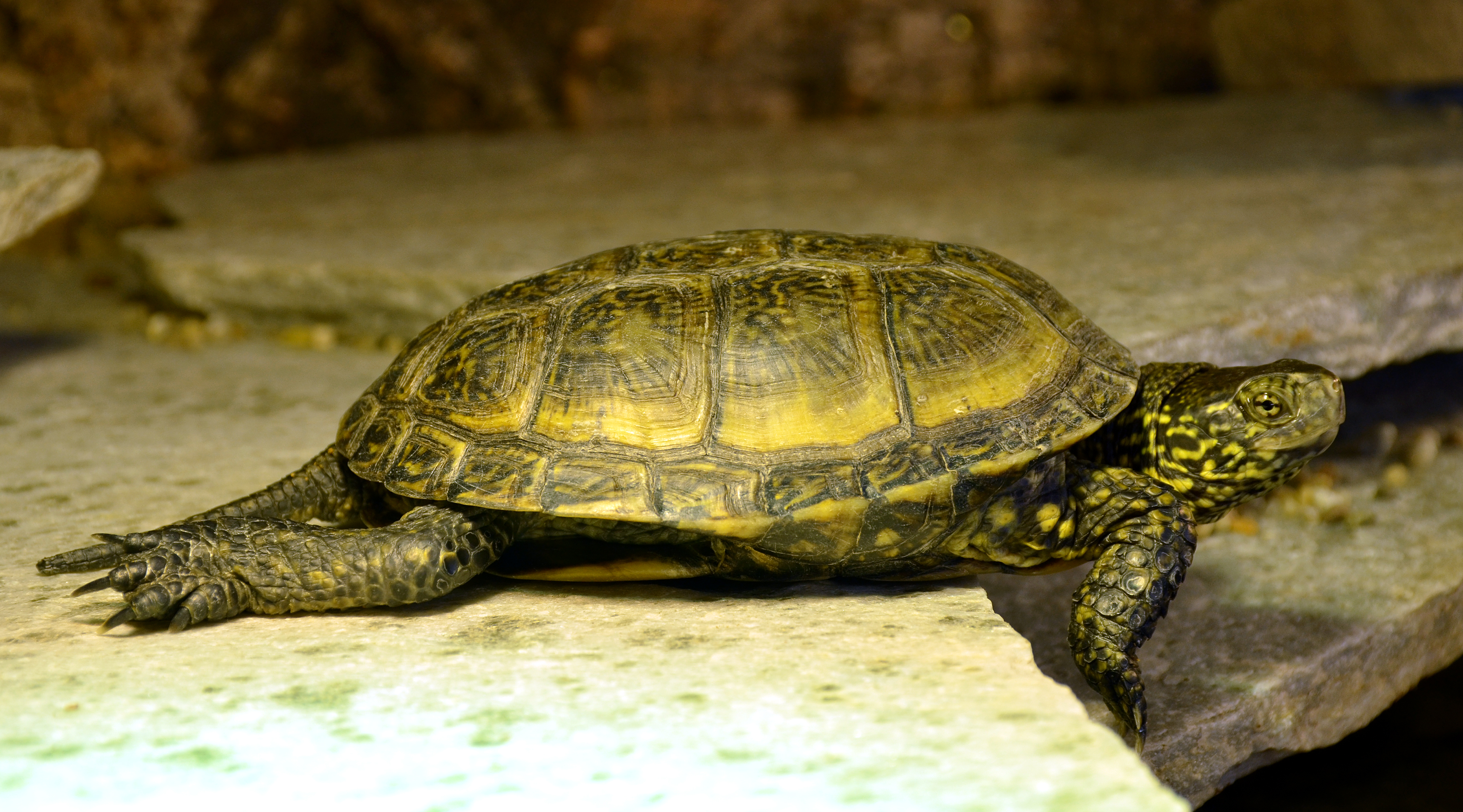 Tortue boueuse ou cistude ( Emys orbicularis ). Exposition "Reptiles du monde ) à Palexpo, à Genève, en Octobre 2014.